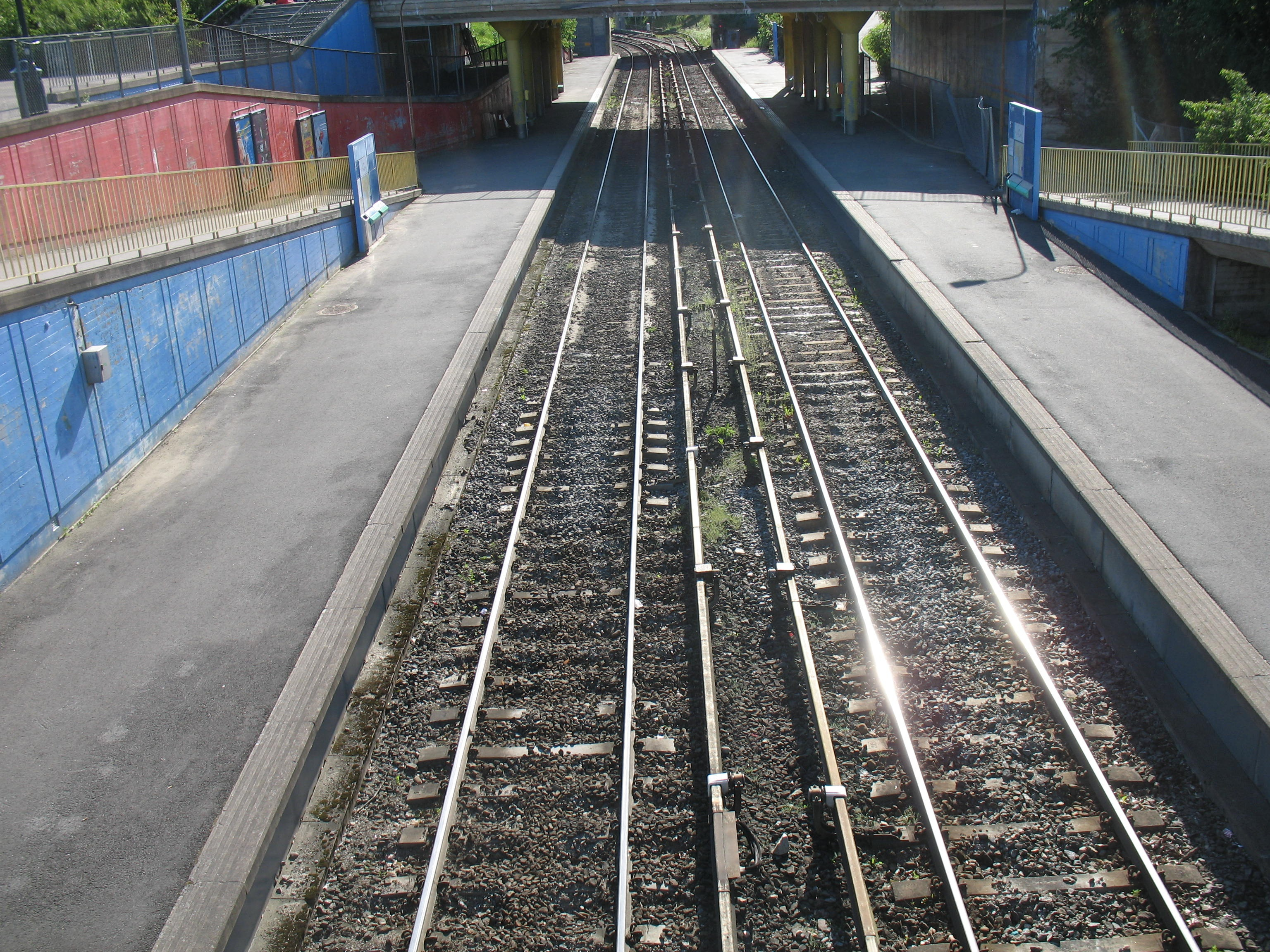 Ryen stasjon, en T-banestasjon i Oslo